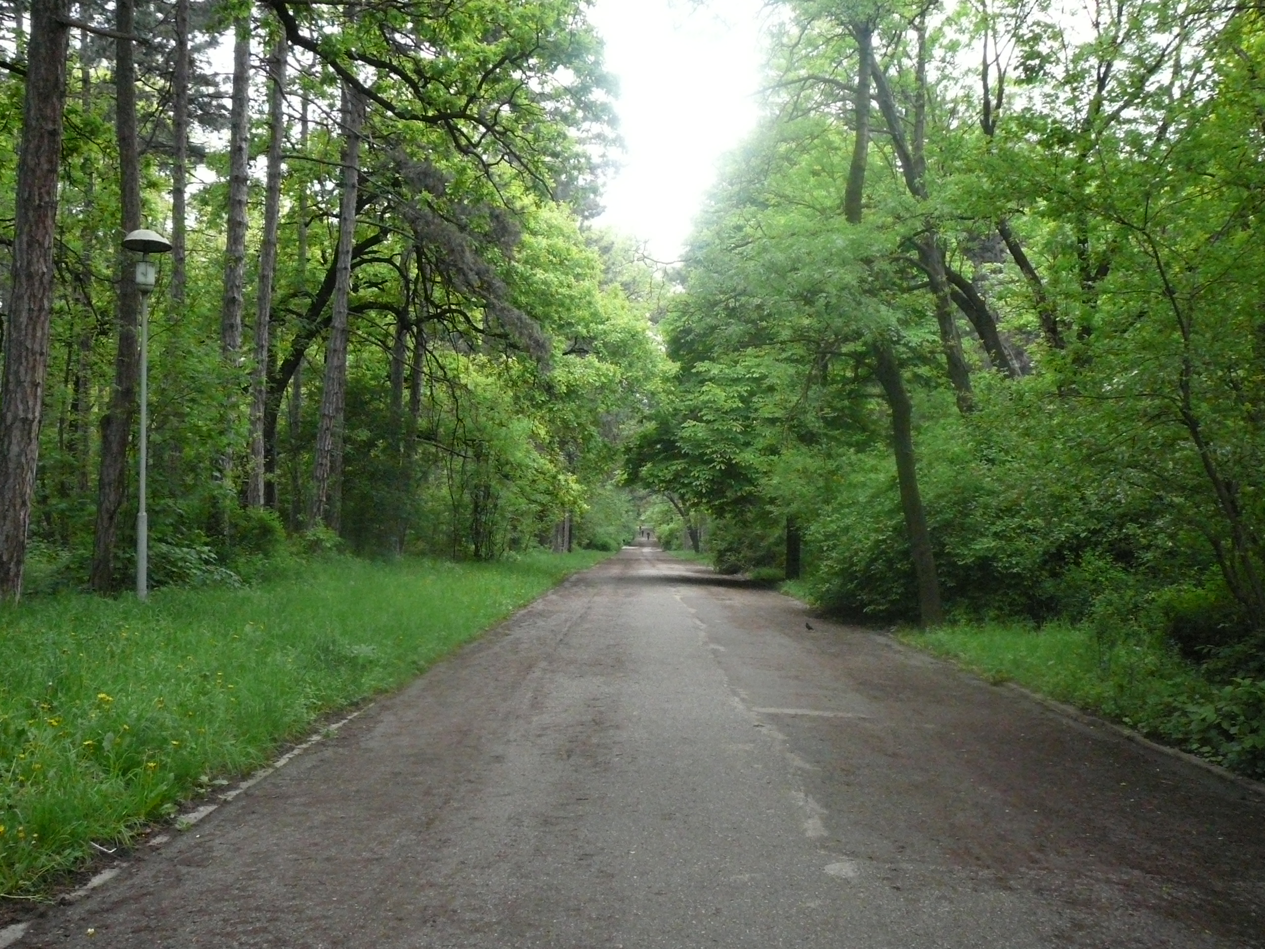 Borisova garden in Sofia,Bulgaria